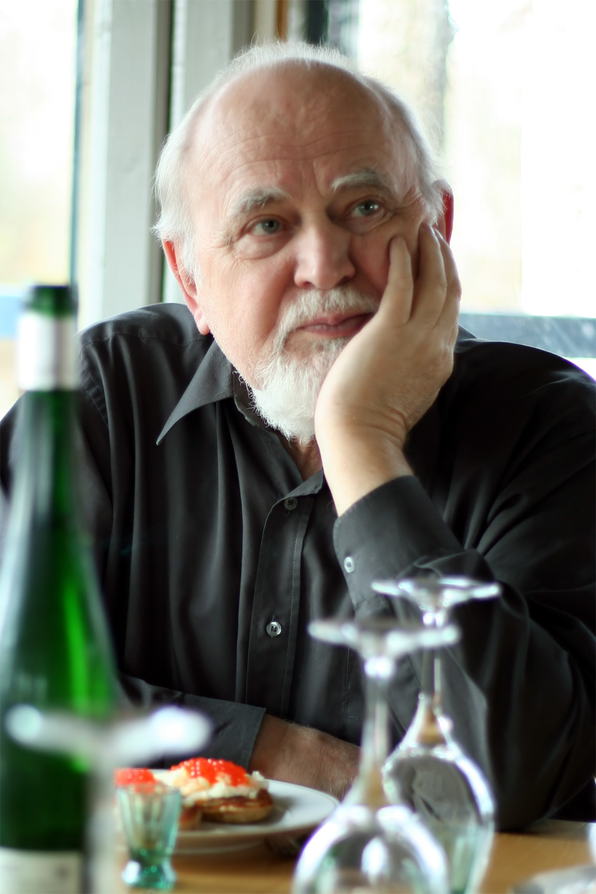 Arhitekt Ado Eigi